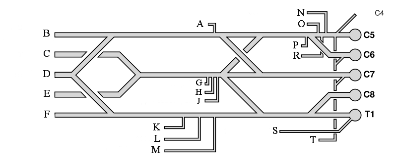 schéma descriptif du plexus brachial chez l'homme avec légende neutre